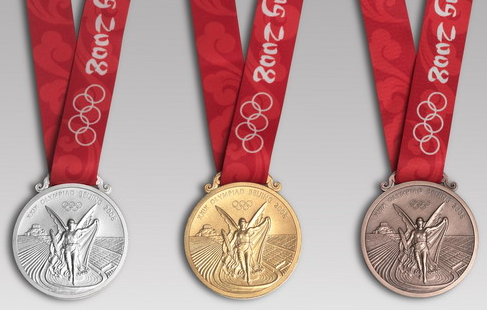 Médaille Olympique Beijing 2008